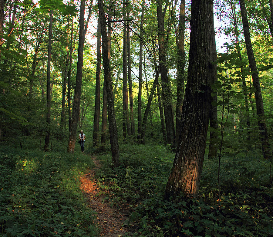 Марийская священная роща Арпынгель: на юго-восточной окраине с. Хмелевки (часть р. п. Васильсурск), на левом берегу р. Хмелевки - между ней и территорией водокачки, Воротынский район, Нижегородская область This image is related to the protected area of Russia number 5210156